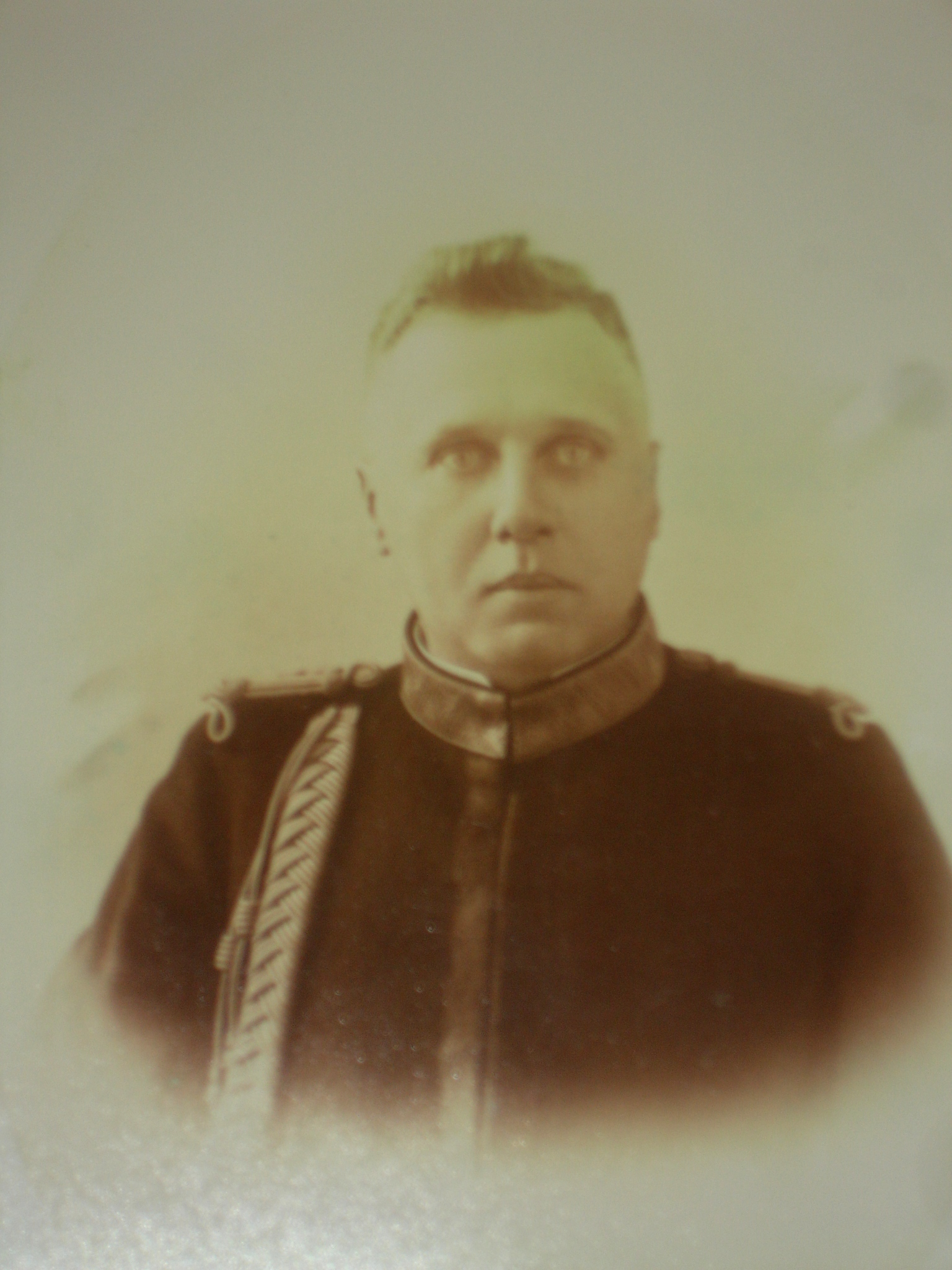 Johan Hendrik Smith (1891-1951), hoofdcommissaris politie in Nederlands-Indie